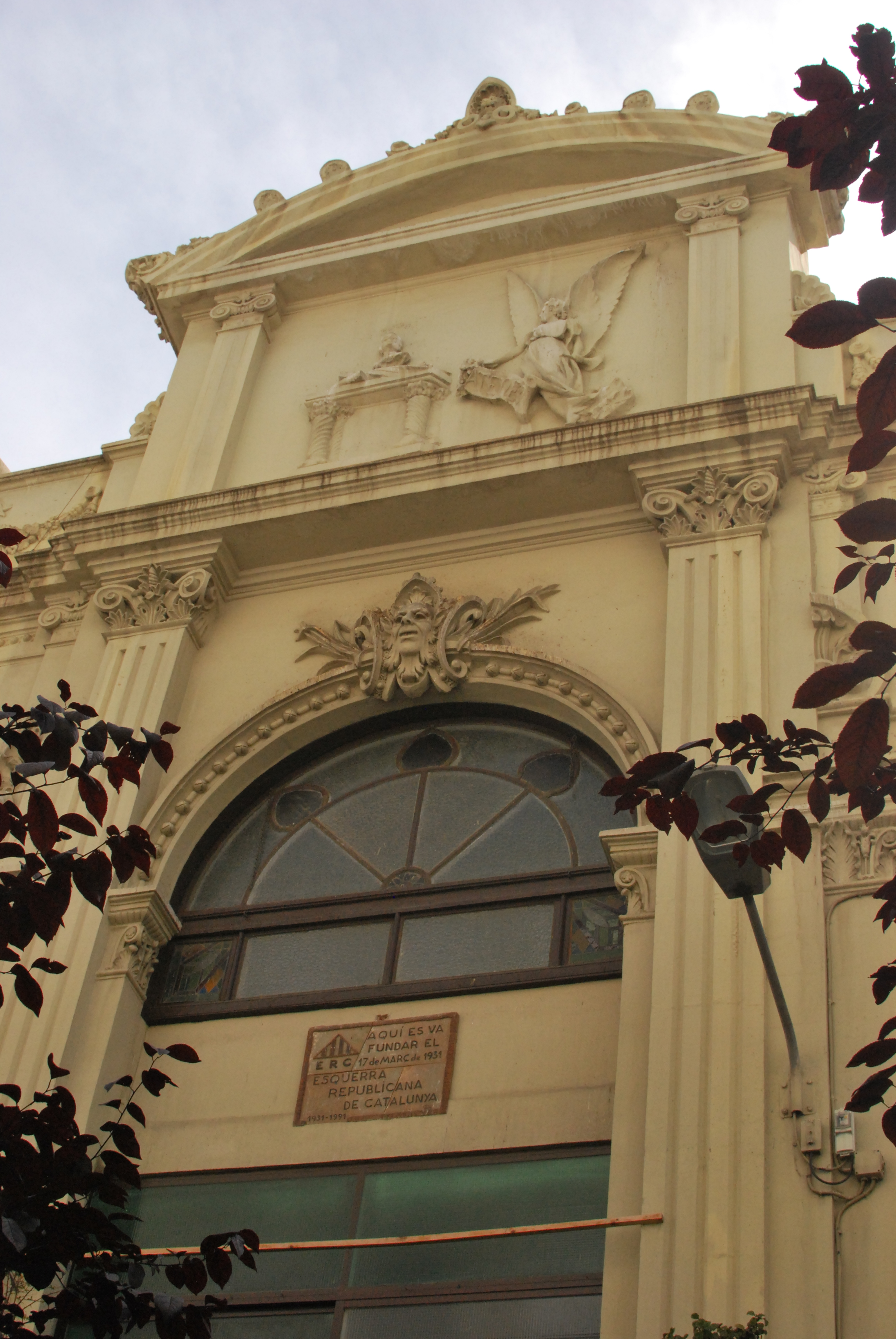 Edifici on es va fundar Esquerra Republicana de Catalunya, al Carrer Cros número 4 del barri de Sants